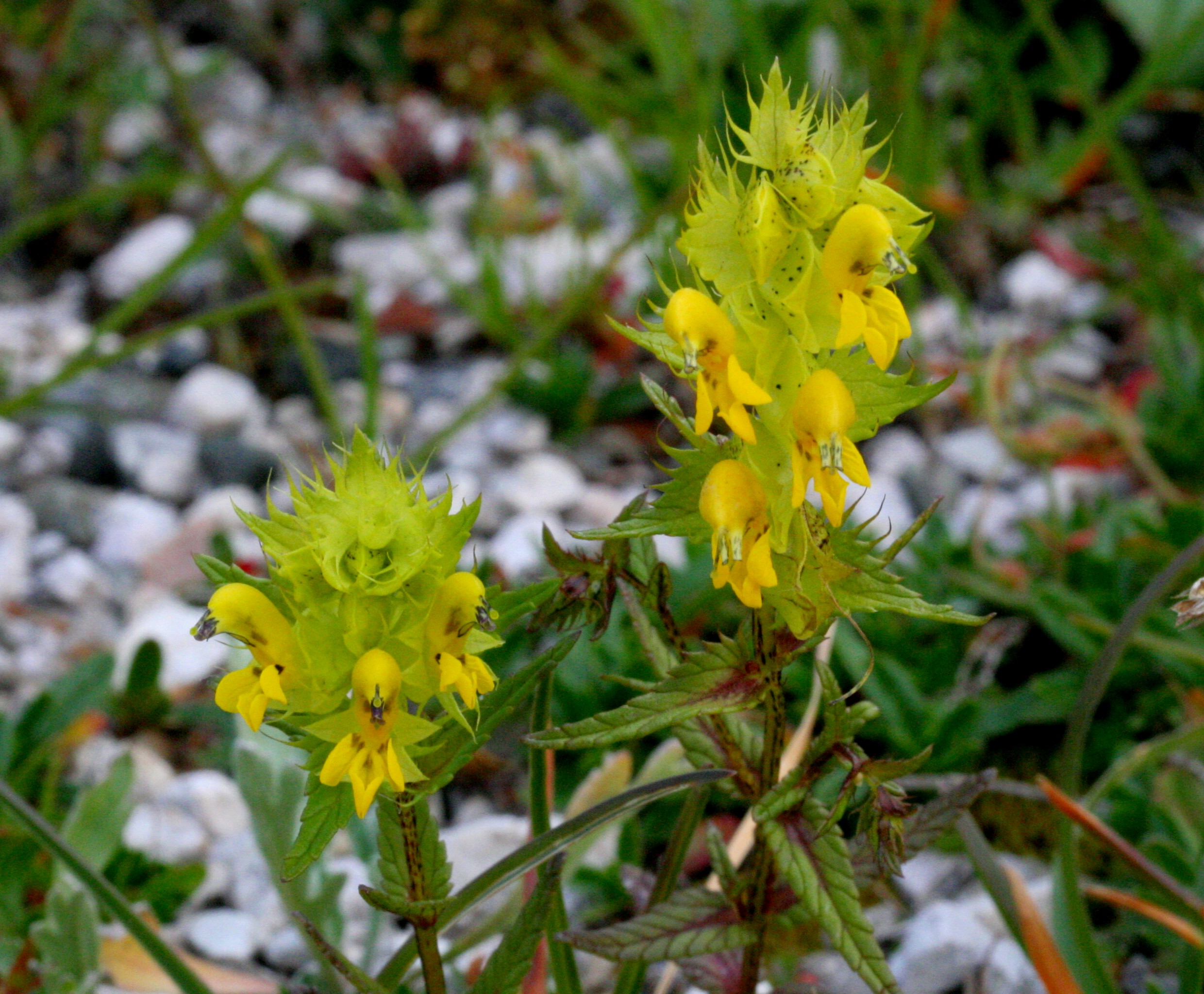 Rhinanthus_alpinus (Cresta di gallo alpina) Località : Passo di Falzarego, Cortina (BL), 2105 m s.l.m.